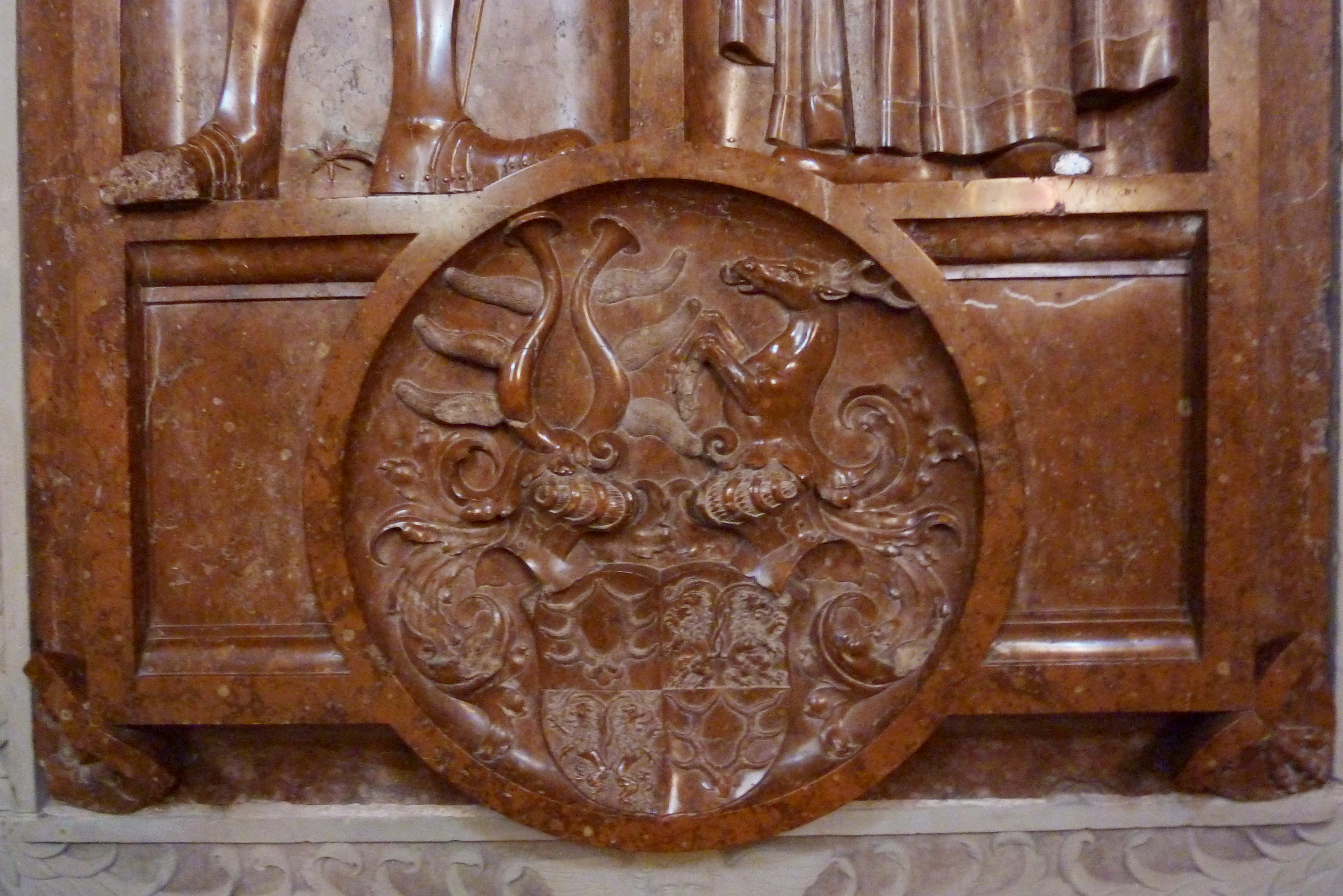 Katholische Pfarrkirche Mariä Himmelfahrt in Hochaltingen, einem Ortsteil von Fremdingen im Landkreis Donau-Ries (Bayern), Renaissancegrabmal (von 1526) von Eberhard von Hürnheim und seiner Gemahlin Anna von Hohenrechberg in der Gruftkapelle, Rotmarmorplatte mit überlebensgroßen Figuren, Allianzwappen der Familien Hürnheim und Rechberg